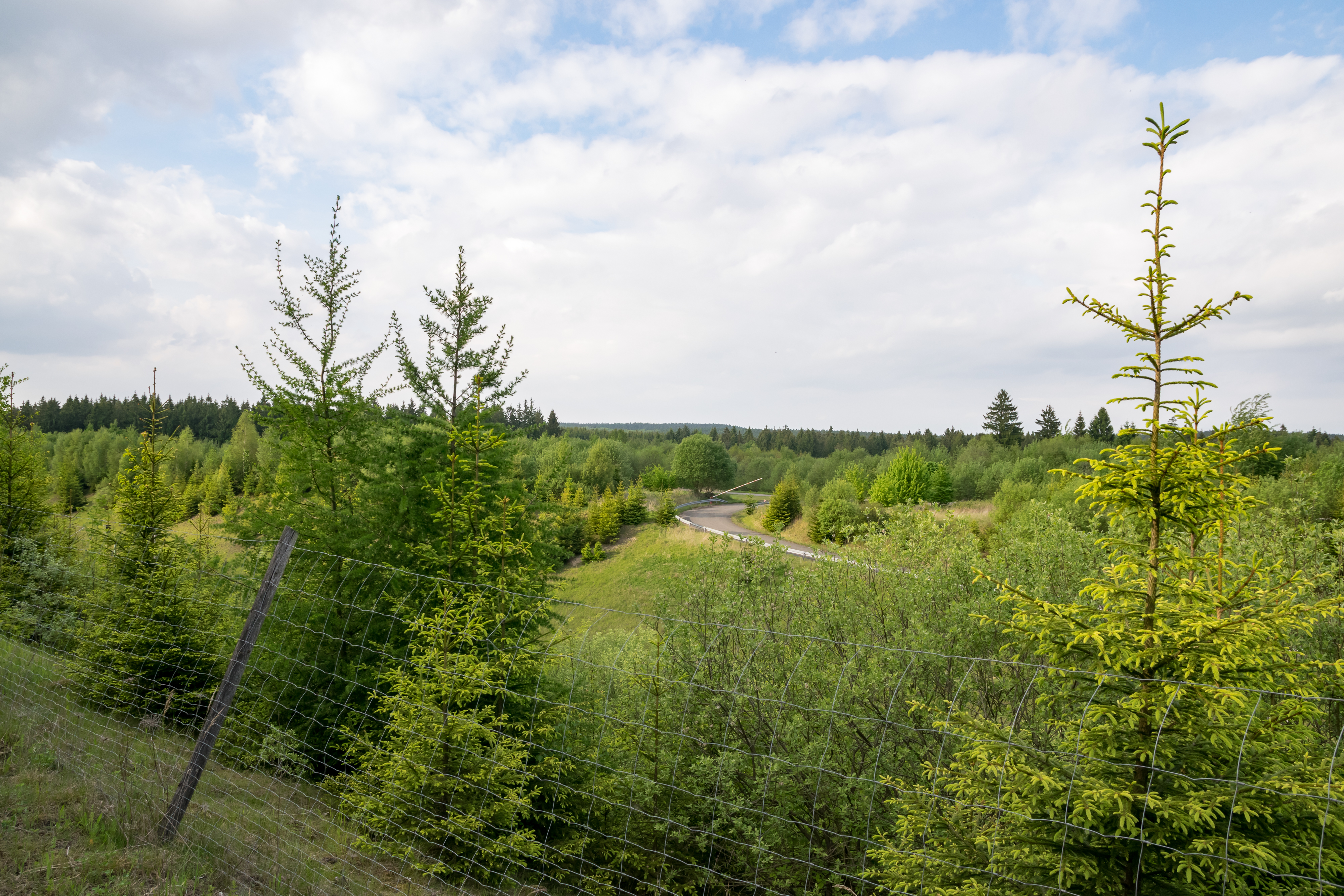 LSG Naturpark Eggegebirge und Teutoburger Wald östlich von Lichtenau-Asseln